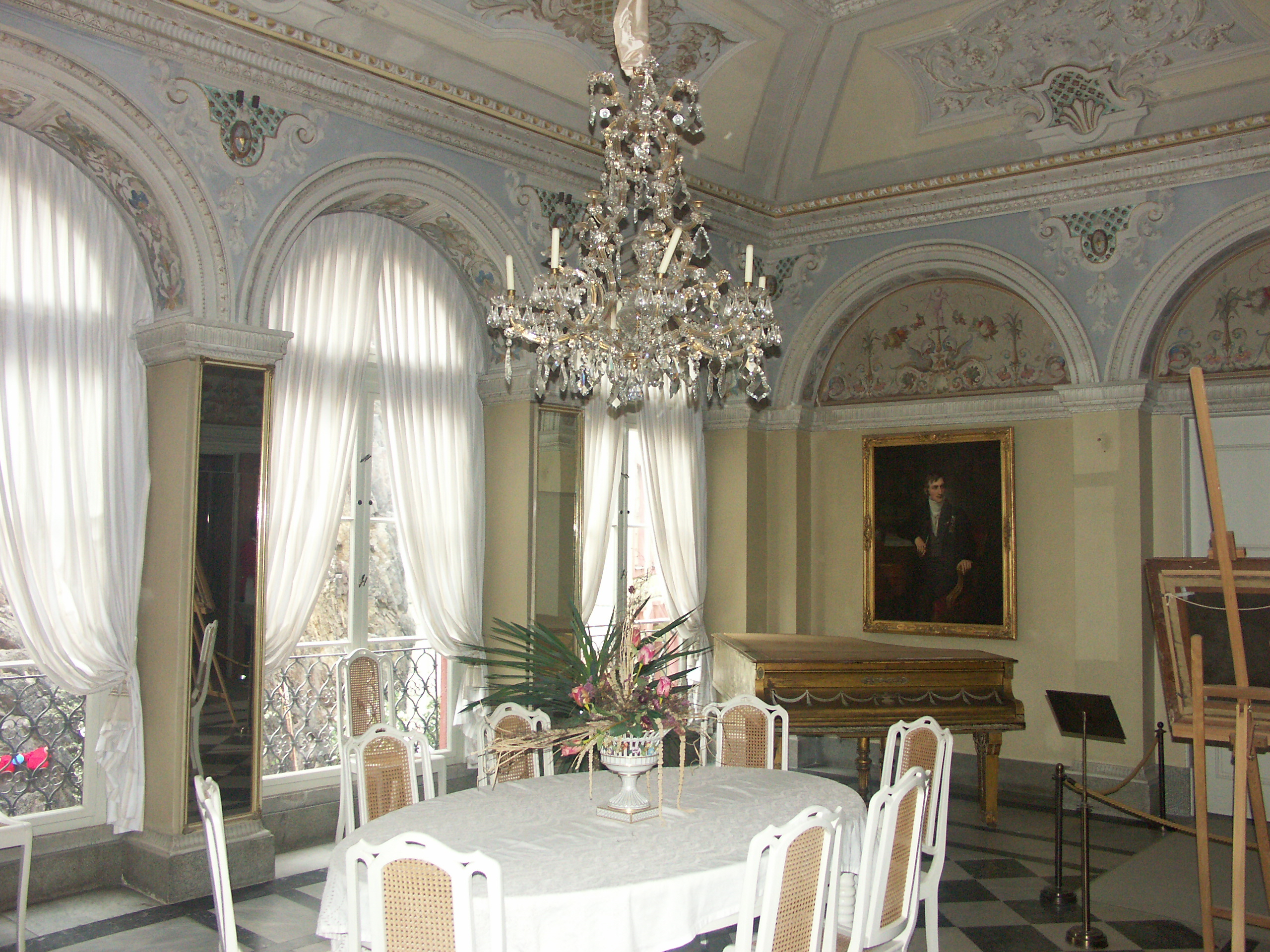 Zimmer auf Schloss Weesenstein